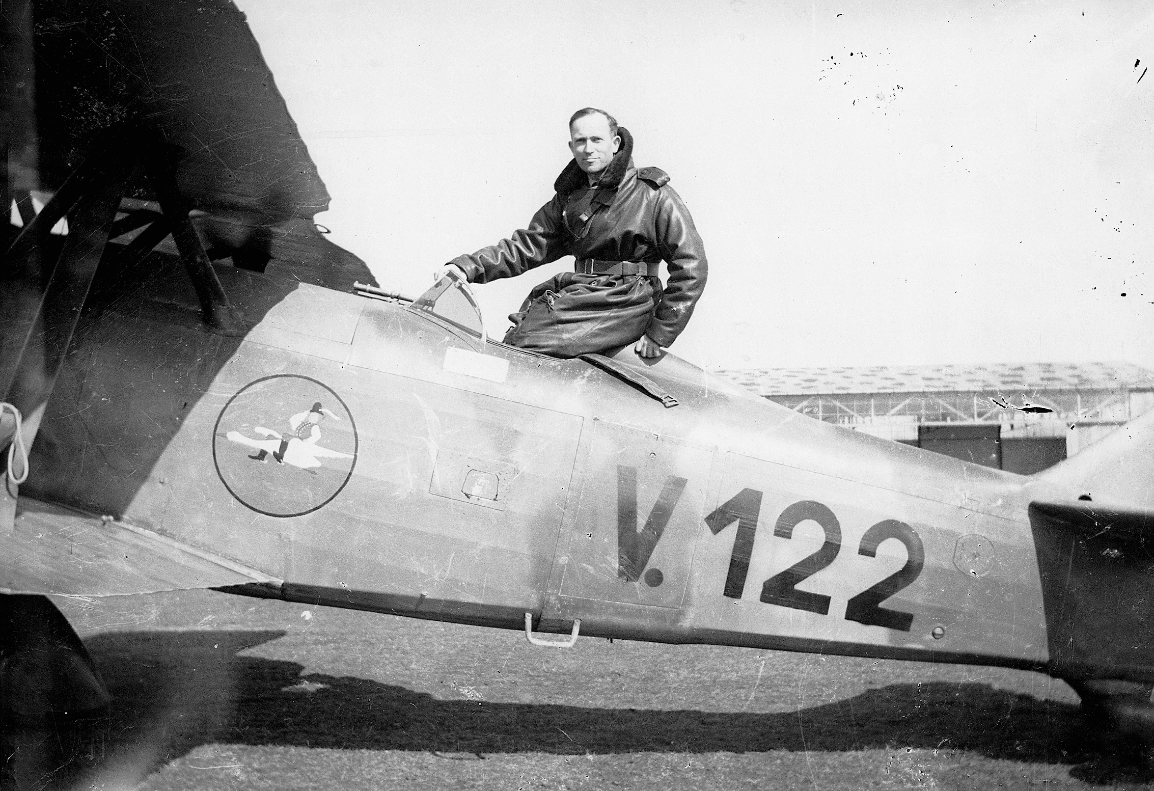 Bánhidi Antal gépészmérnök, repülőgép tervező, tartalékos hadnagy Fiat CR-32 vadászrepülőgépen. Tags: Royal Hungarian Air Force, Fiat-brand, airplane, Italian brand, fighter;plane, second World War, military, Antal Bánhidi design Title: Bánhidi Antal gépészmérnök, repülőgép tervező, tartalékos hadnagy Fiat CR-32 vadászrepülőgépen.